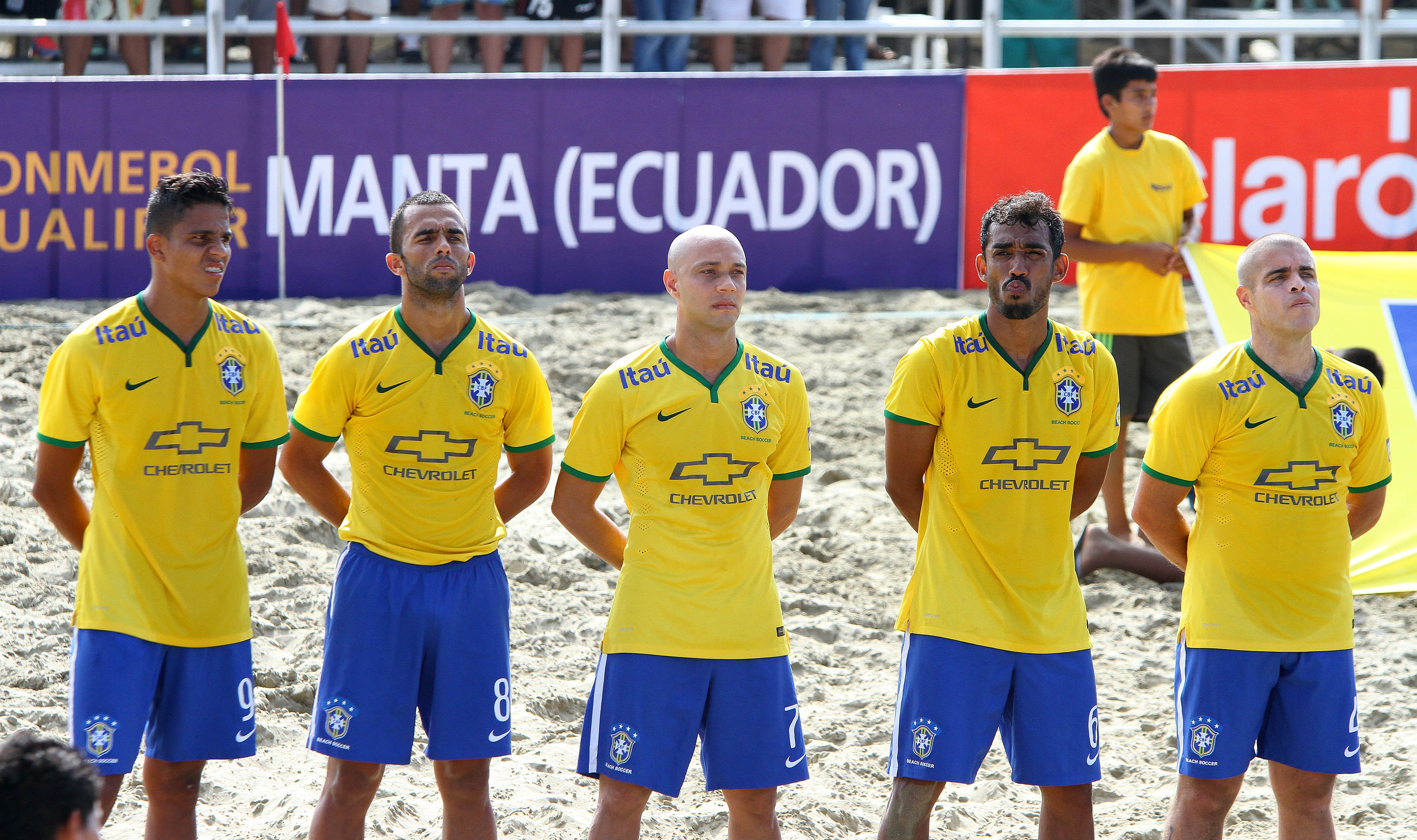 Manta, 25 de abr (Andes).El equipo de fútbol playa de Brasil clasifico a la final del Sudamericano de fútbol playa 2015 al derrotar a Ecuador por el marcador de 14-1 Foto:César Muñoz/Andes